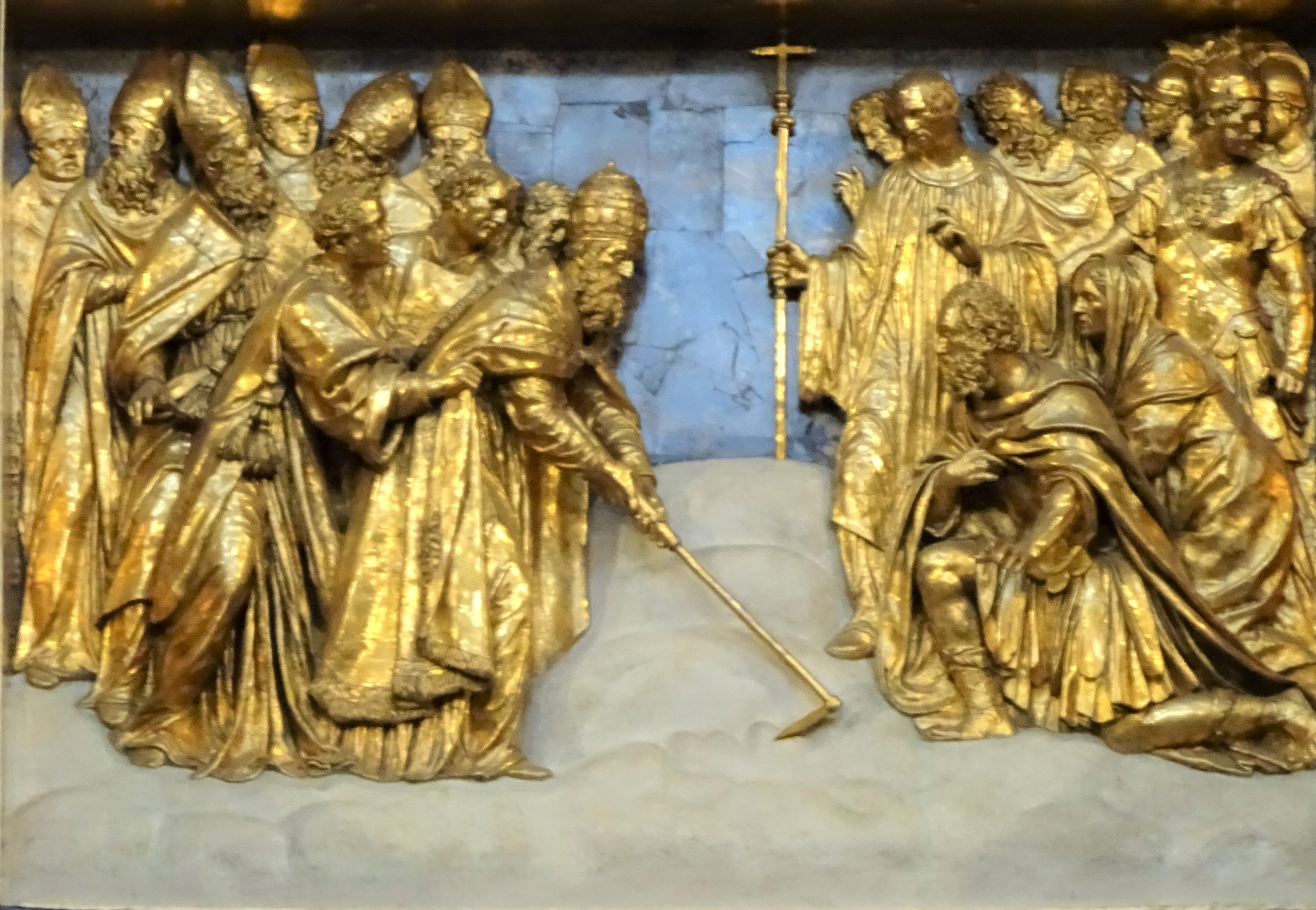 Paus Liberius tekent de omtreklijnen van zijn basiliek af in de sneeuw. Verguld bronzen reliëf boven het altaar van de Kapel van Paulus V in de Santa Maria Maggiore.